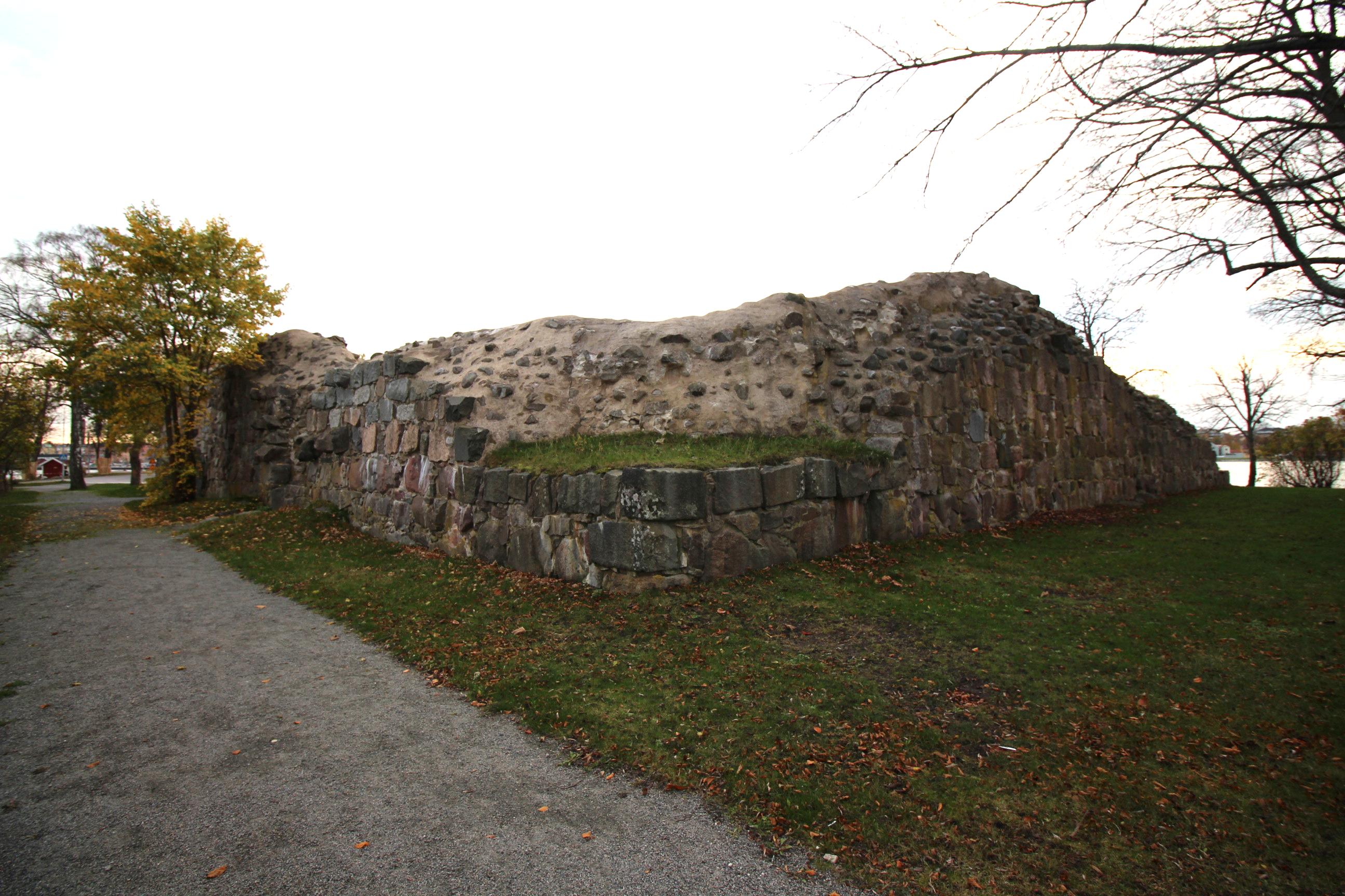 Stegeholm (Västervik 51:1)